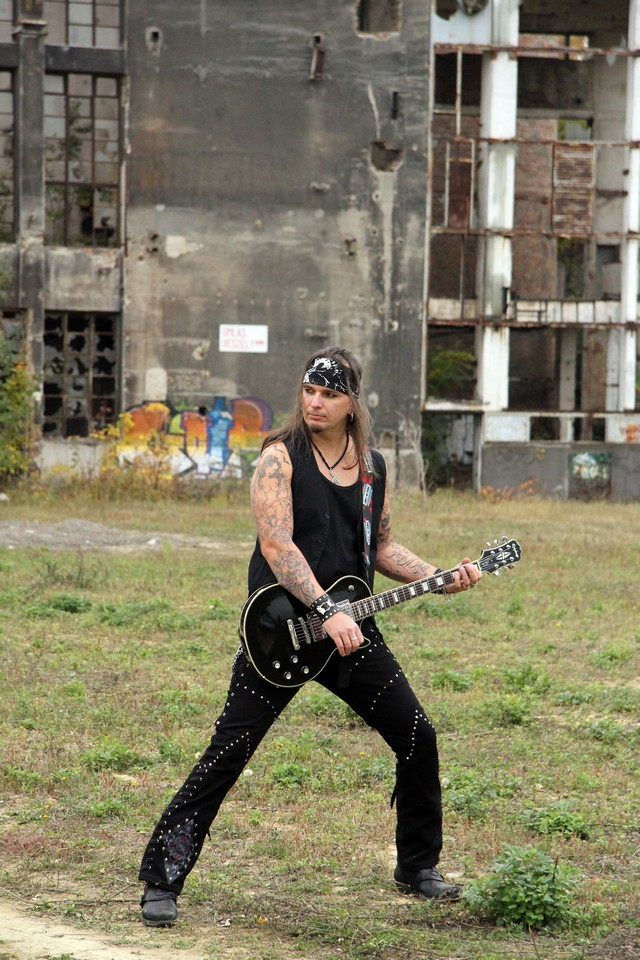 Új lemezek